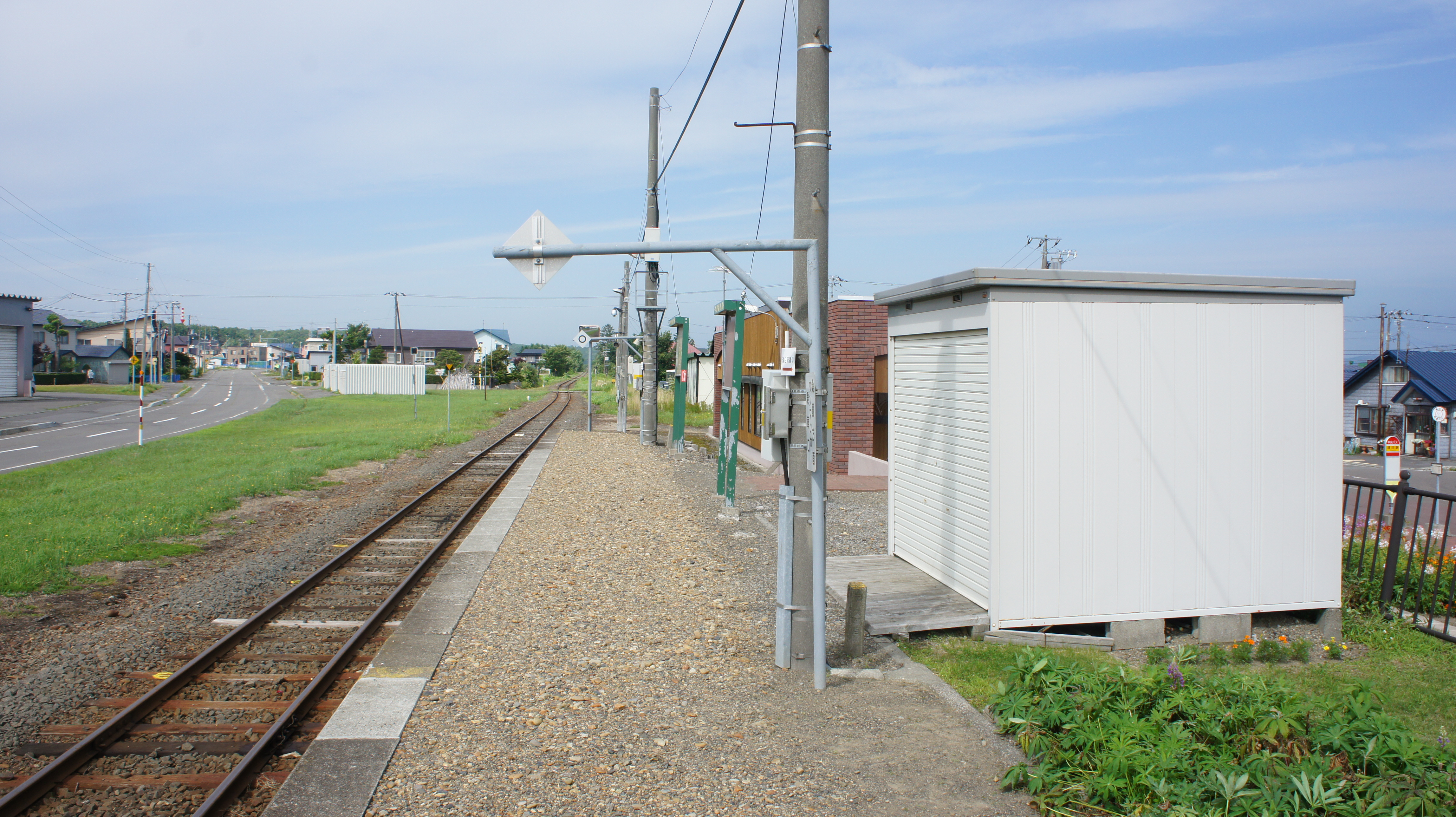 JR札沼線・浦臼駅のホーム